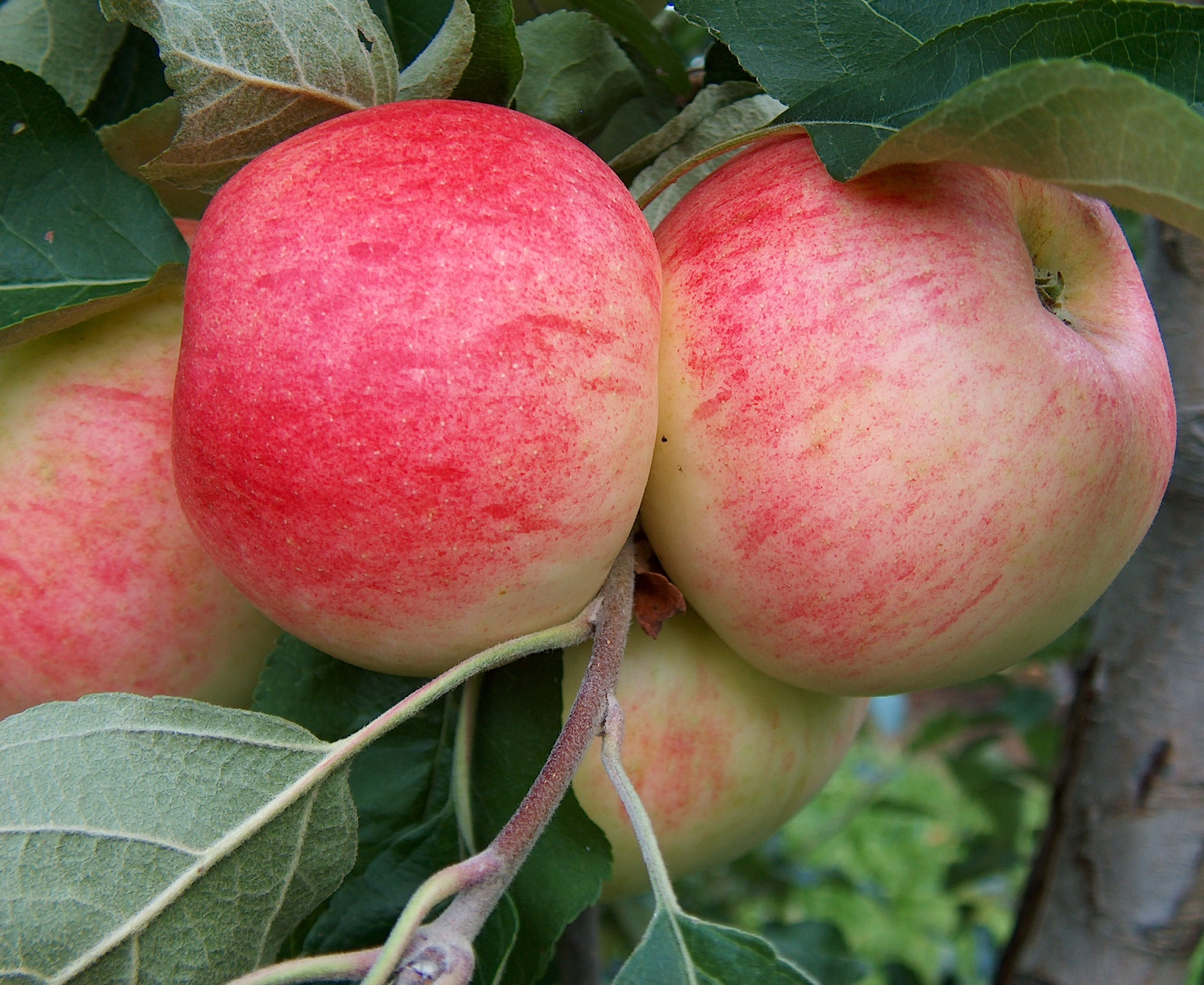 Äpfel der Sorte Delrouval-Cybele am Baum